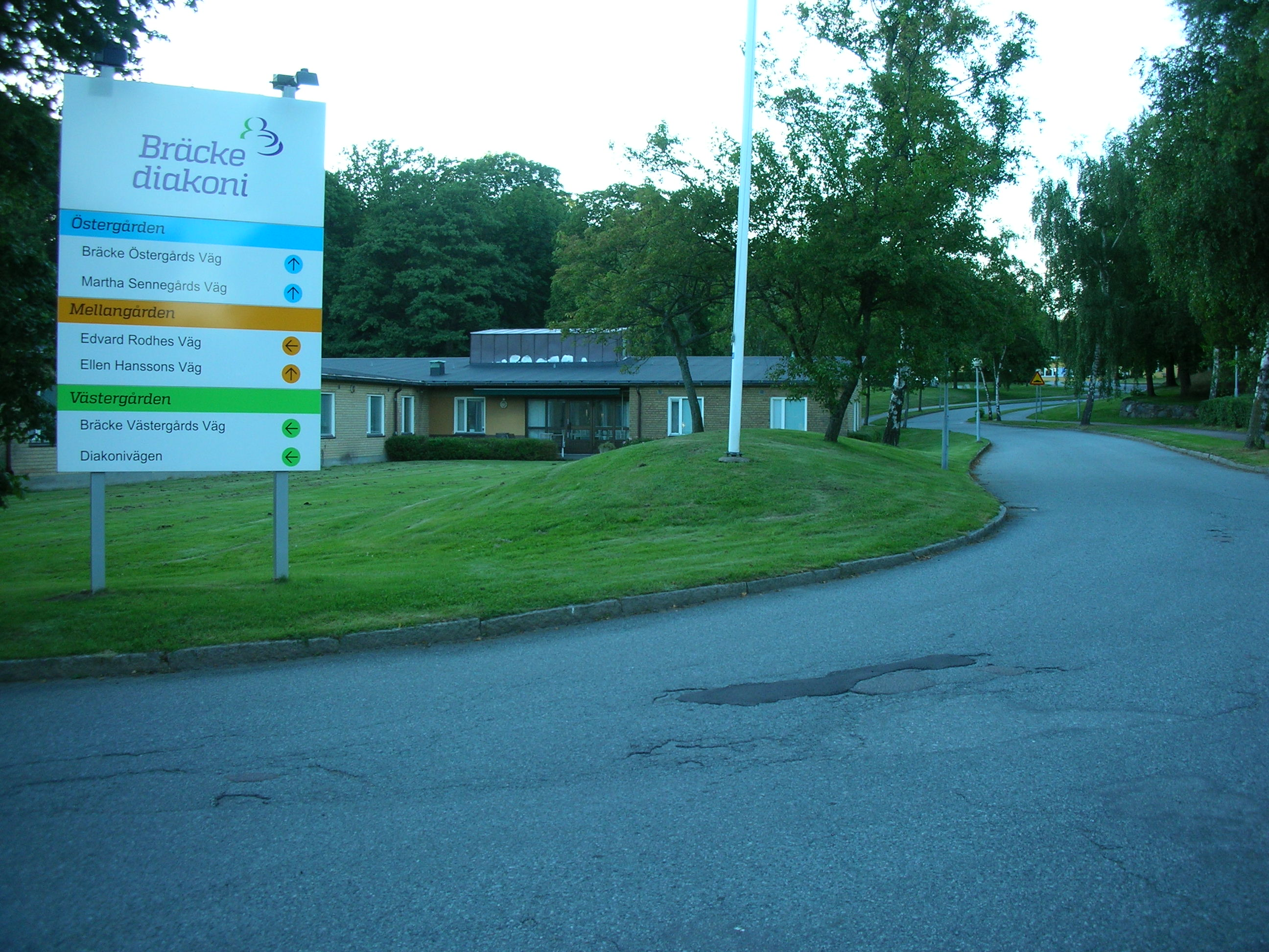 Bräcke diakoni, Göteborg.